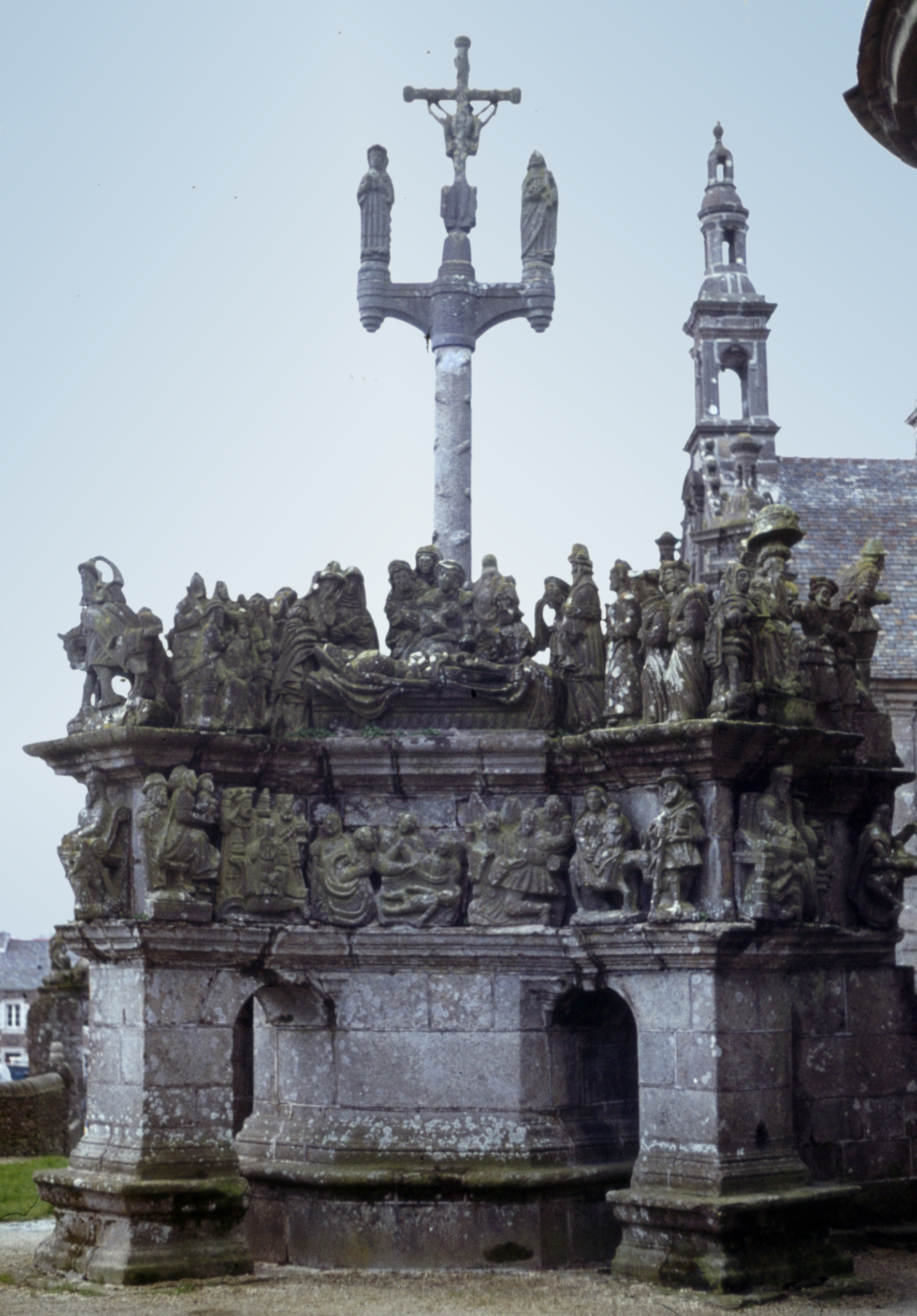 Guimiliau